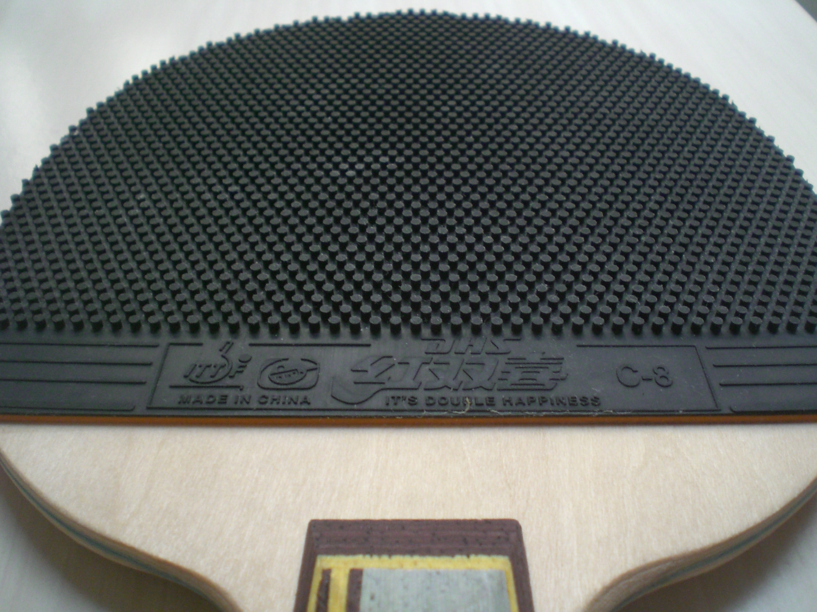 紅雙喜牌子桌球拍, 中國製造中國馳名商標